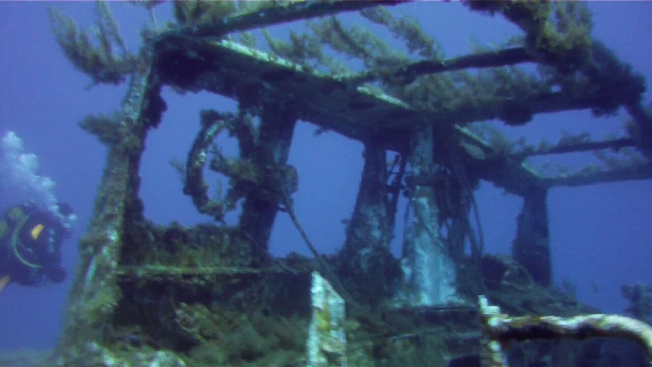 Malte : l'épave du P29